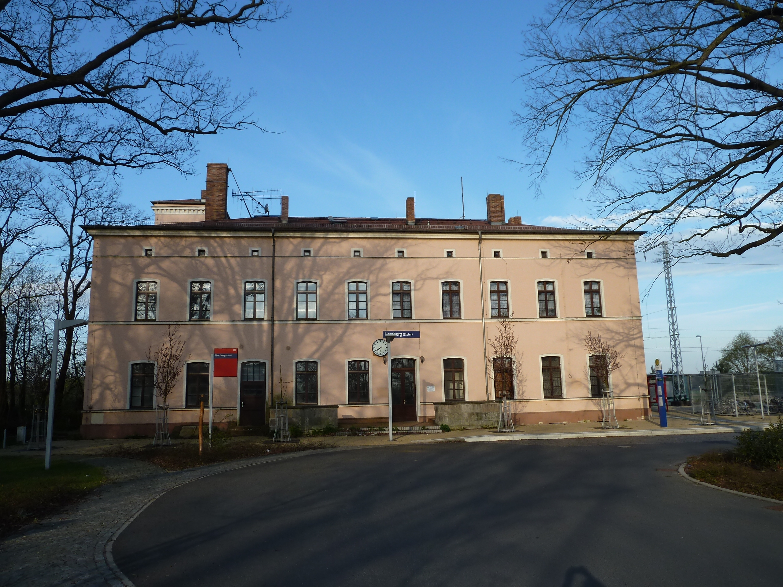 Bahnhof Herzberg West, Straßenseite